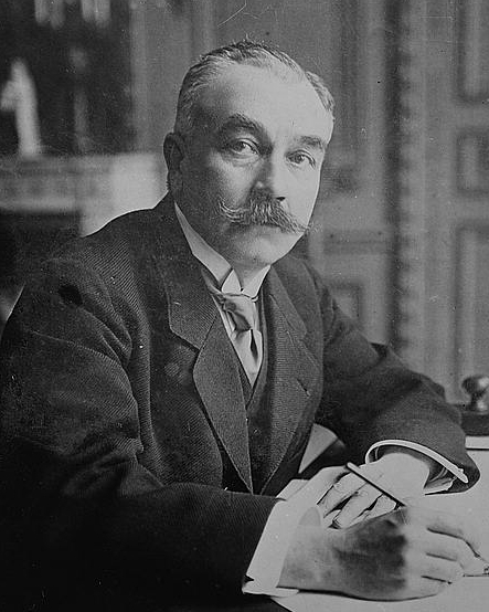 French politician Gabriel Guist'hau (1863-1931)